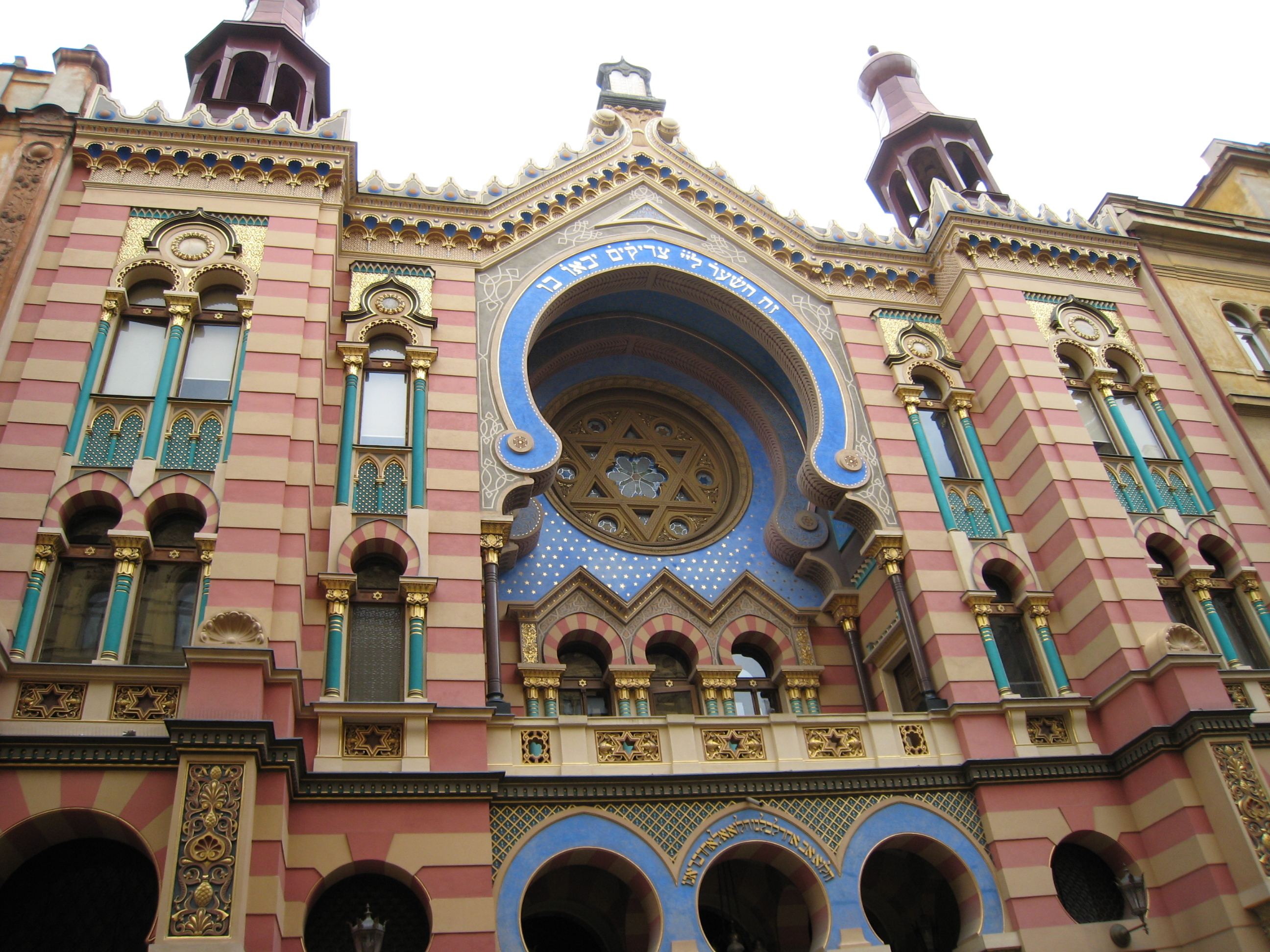 Synagoge in Prag